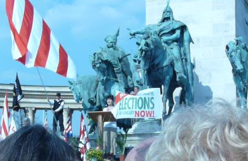 A felvétel 2009. április 5-én, Virágvasárnap készült a Hősök terén, Budapesten. A Civil Összefogás Fórum megalakulása. Az alakuló mozgalom tömegbázisának alapjai a a polgári körök voltak. Biró Ildikó: 3.37: Elhoztam a Polgári Körök új zászlaját, amely a sebzett 56-os eszmeiséget kereszttel gyógyítva tölti be. Ez a zászló lehet a ma születő új összetartozás jelképe is.